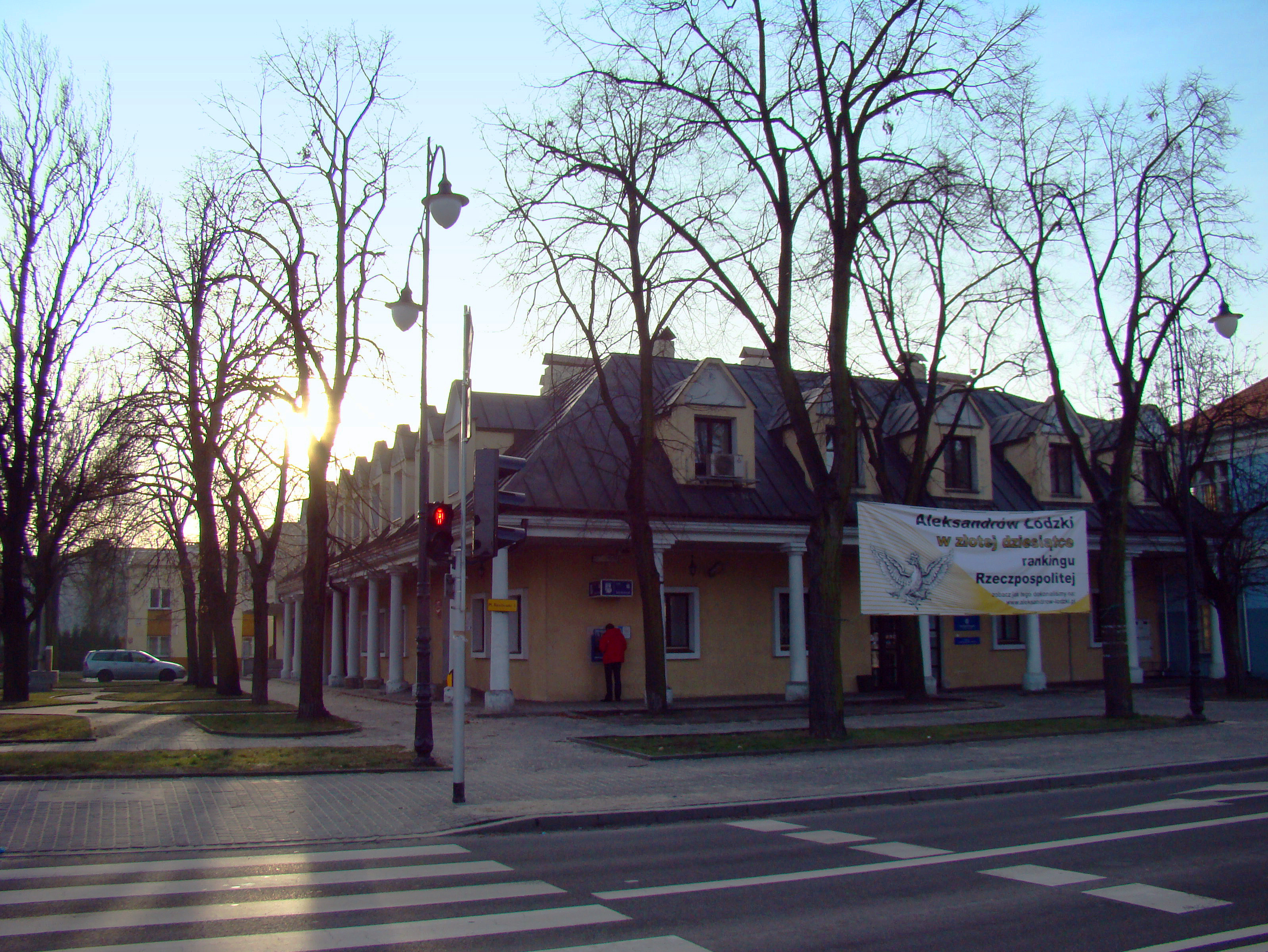 Aleksandrów Łódzki, pl. Kościuszki 1 - dawne jatki miejskie, 1825 (zabytek nr A/625)